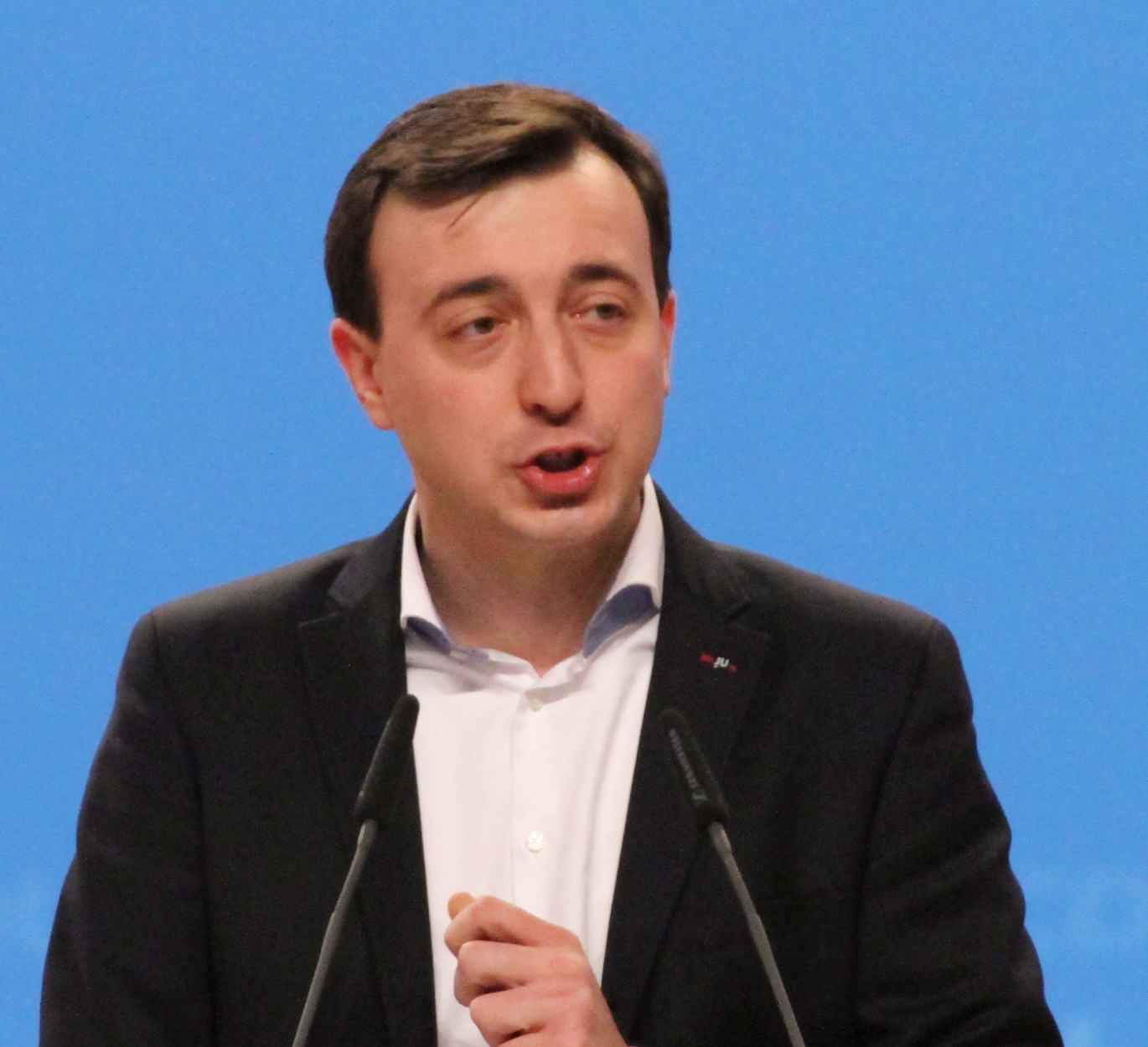 Paul Ziemiak auf dem CDU Bundesparteitag Dezember 2014 in Köln